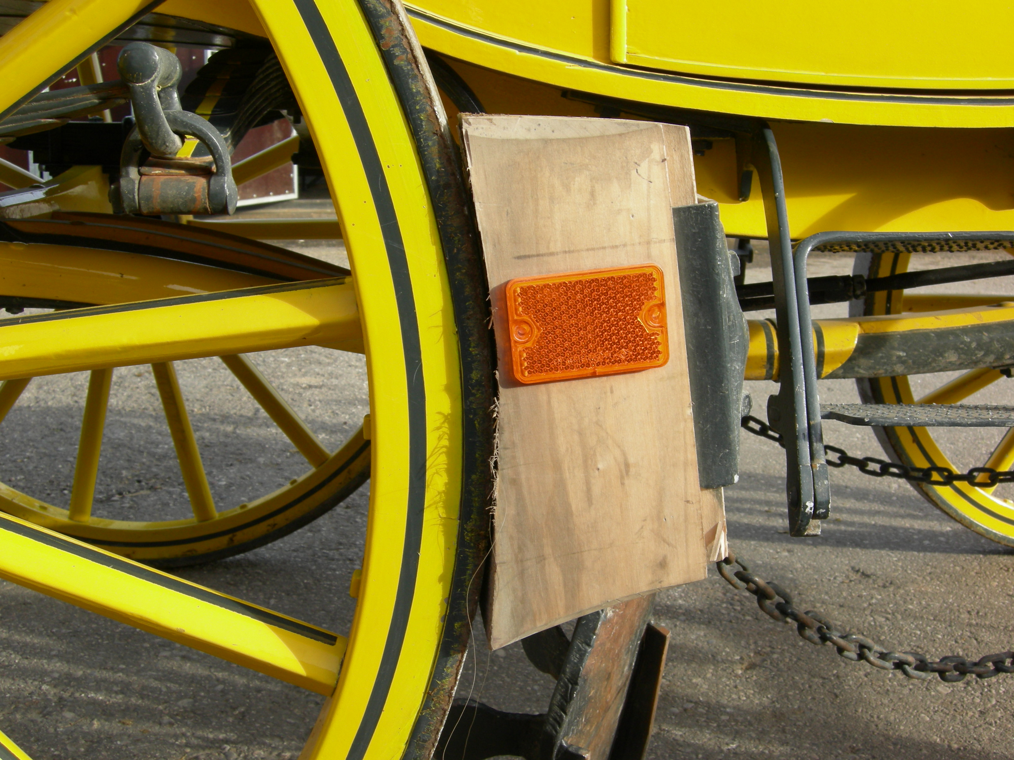 Neuer Bremsklotz aus Holz an der Schleifbremse einer historischen Postkutsche